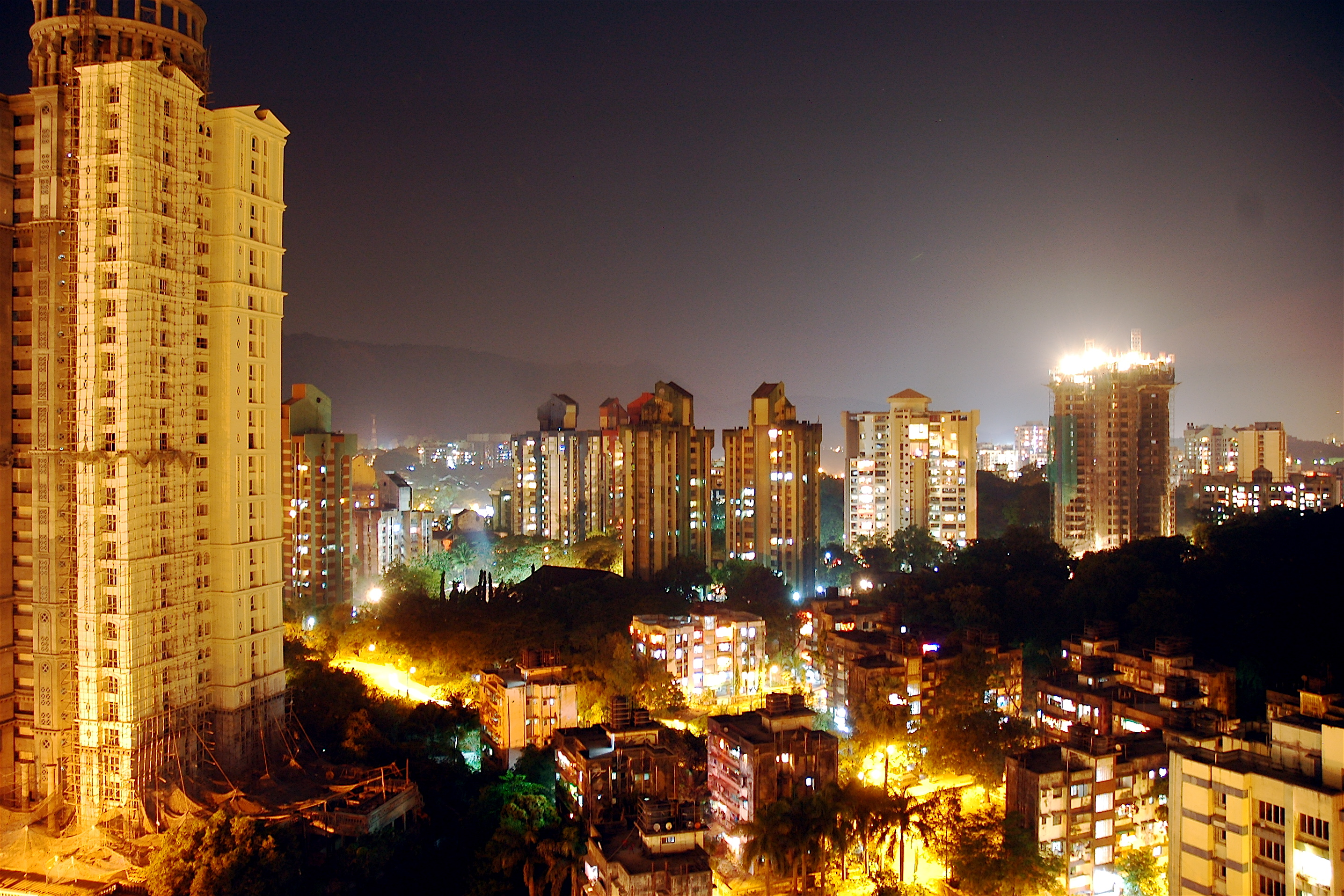 large